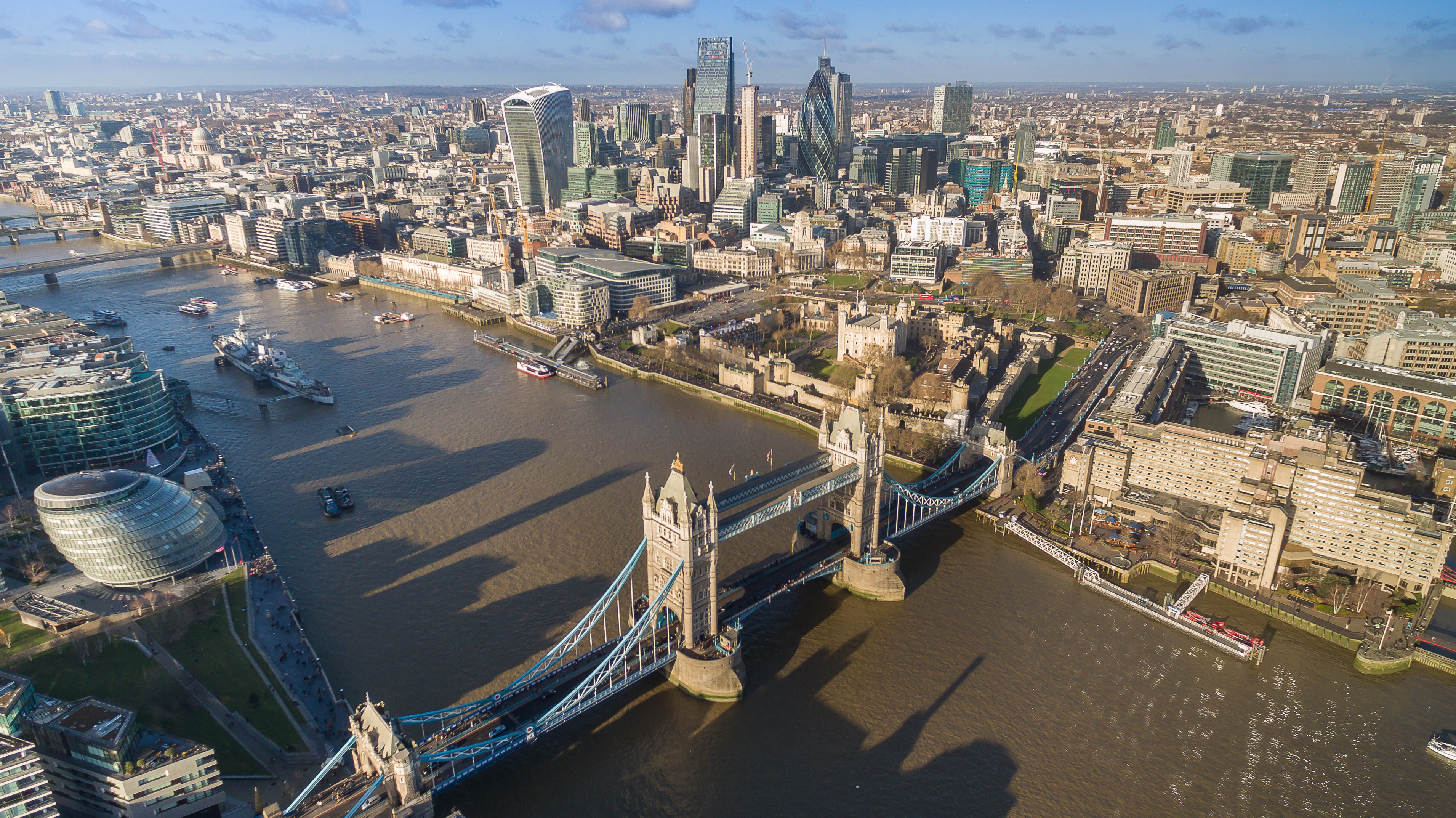 Berühmte Brücke aus dem 19. Jahrhundert in London